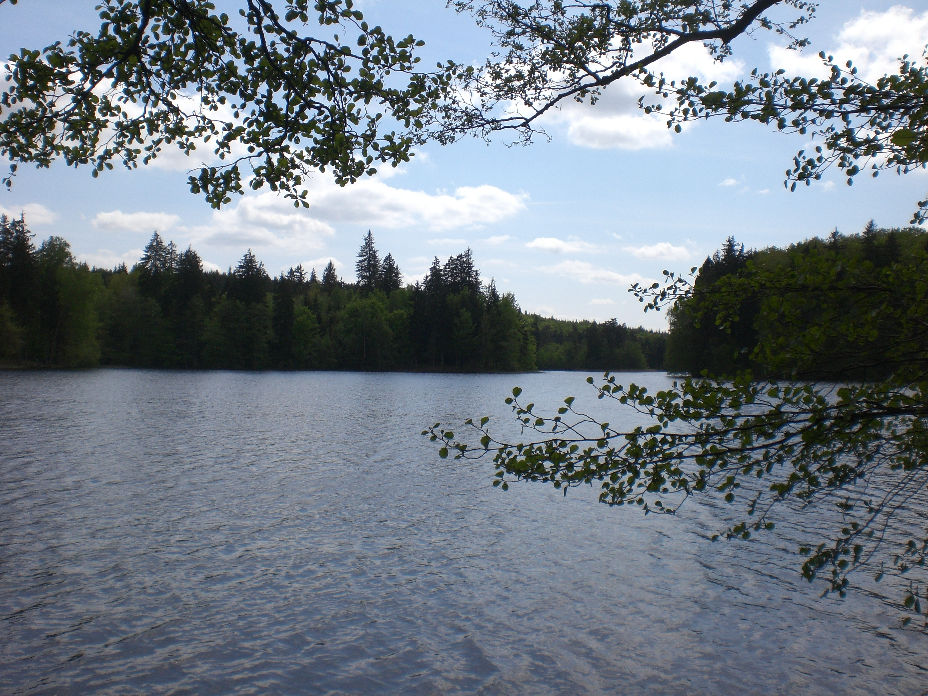 Wielkie Łąki - jezioro wytopiskowe położone na Pojezierzu Kaszubskim